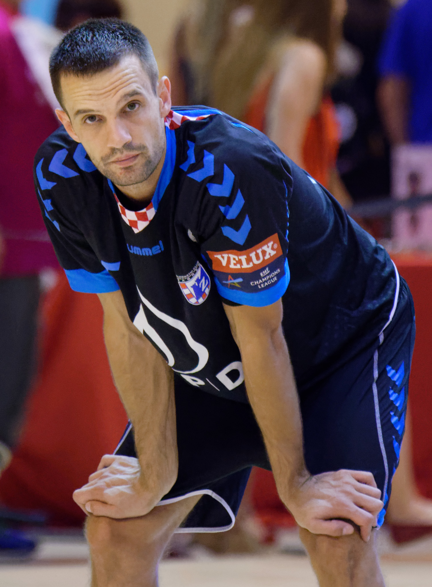 Rencontre du challenge Marrane 2016 entre l'US Dunkerque et les croates du RK Zagreb